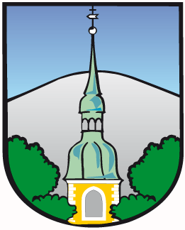 Wappen von Crostwitz Hornjoserbsce: Wopon gmejny Chrósćic.